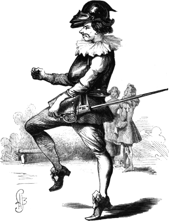 Sganarelle ou le Cocu imaginaire de Molière : « Allez, fripier d'écrits, impudent plagiaire. »